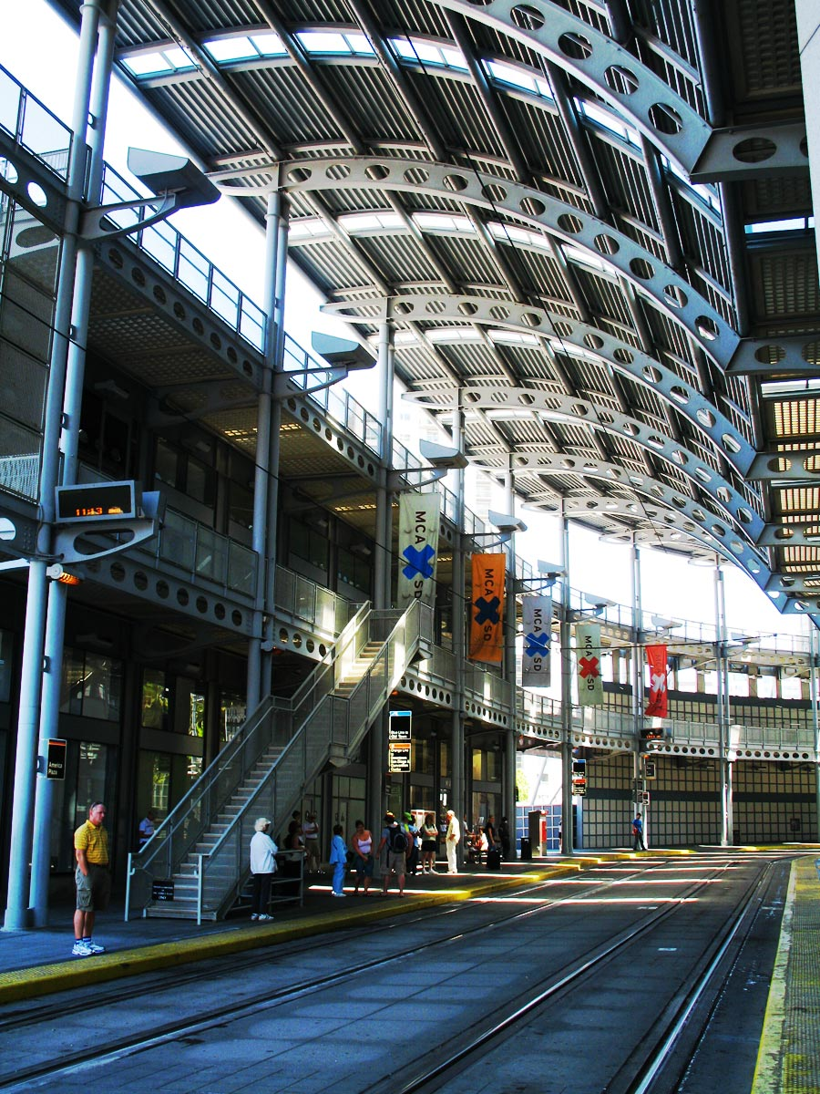 One America Plaza Station